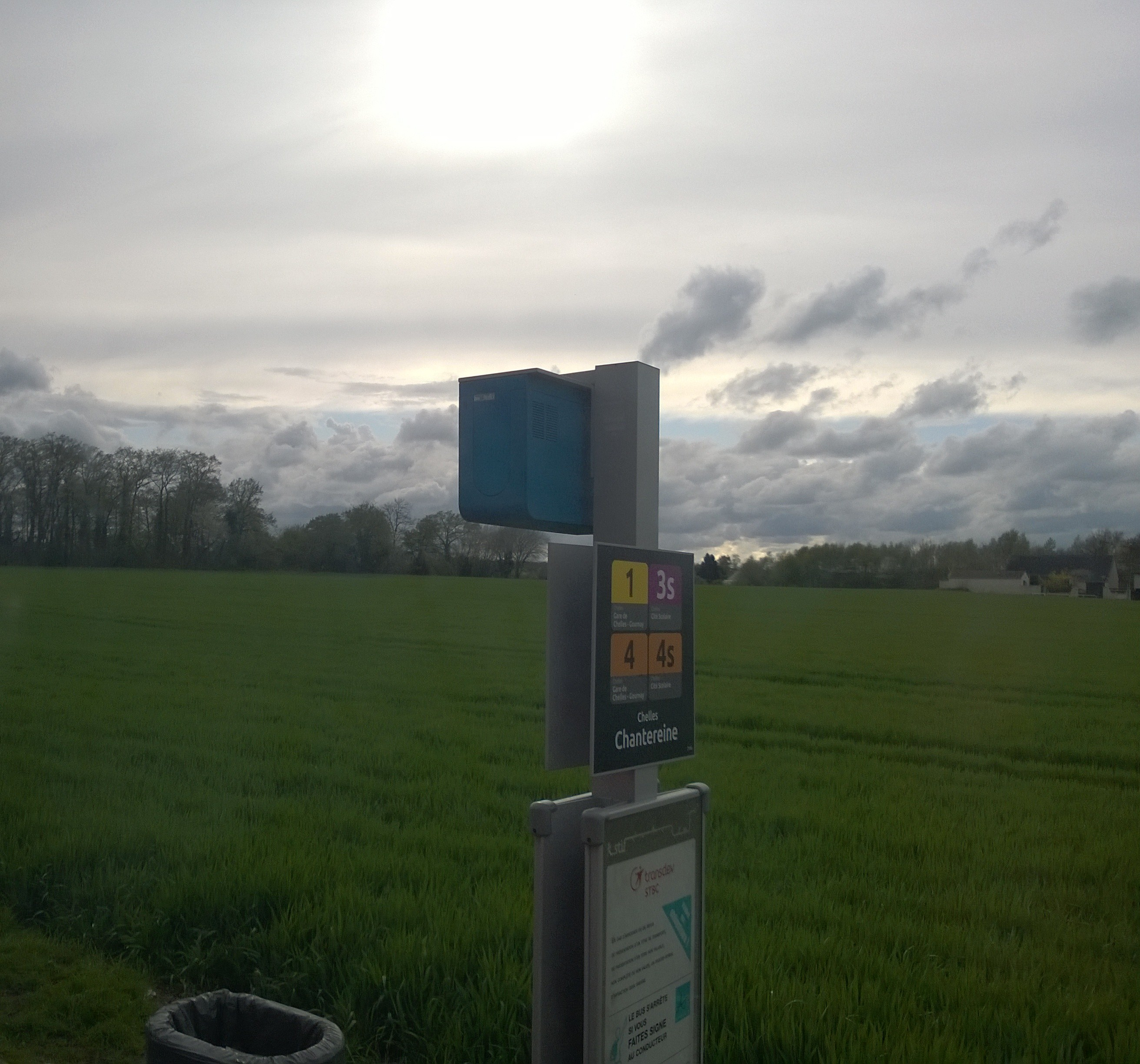 Le panneau utilisé par la STBC depuis la restructuration du 16 avril 2018, commun à tous les transporteurs appartenant à Transdev, à l'arrêt Chantereine.